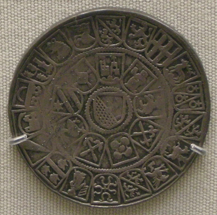 Zurigo, tallero d'argento del 1526